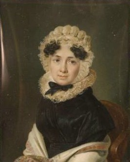 Мария Петровна Супонева, урожденная Неклюдова (1777—1844)